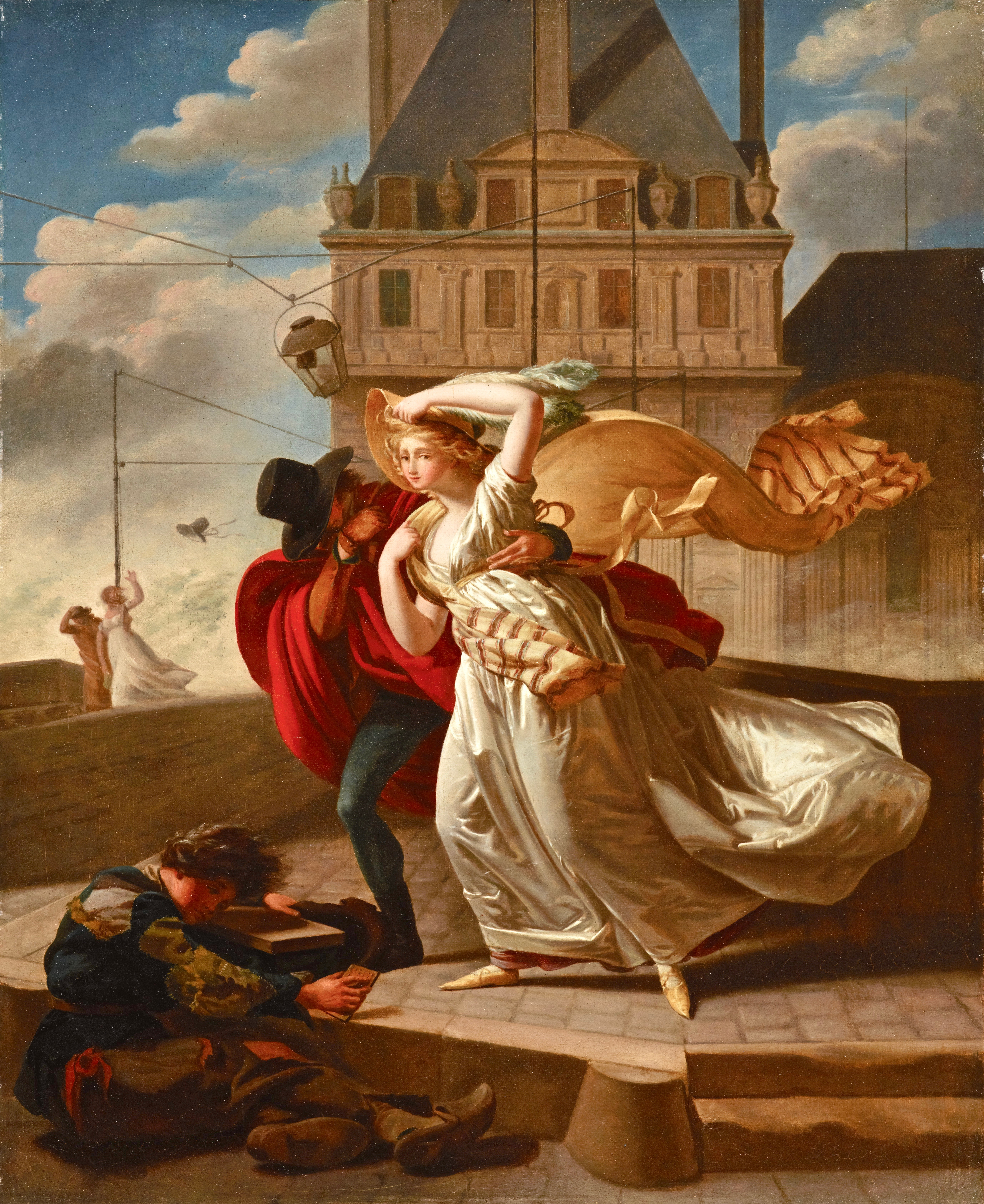 Michel Garnier (1753–1829): Windstoß auf dem Pont Royal (damals Pont National). Öl auf Leinwand, 46 × 38 cm. Ausgestellt unter dem Titel Le coup de vent im Salon von 1799 (Nr. 125). Dallas Museum of Art, Leihgabe der Michael L. Rosenberg Foundation.